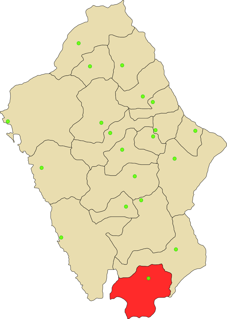 Provincia de Ocros de departamento Ancash